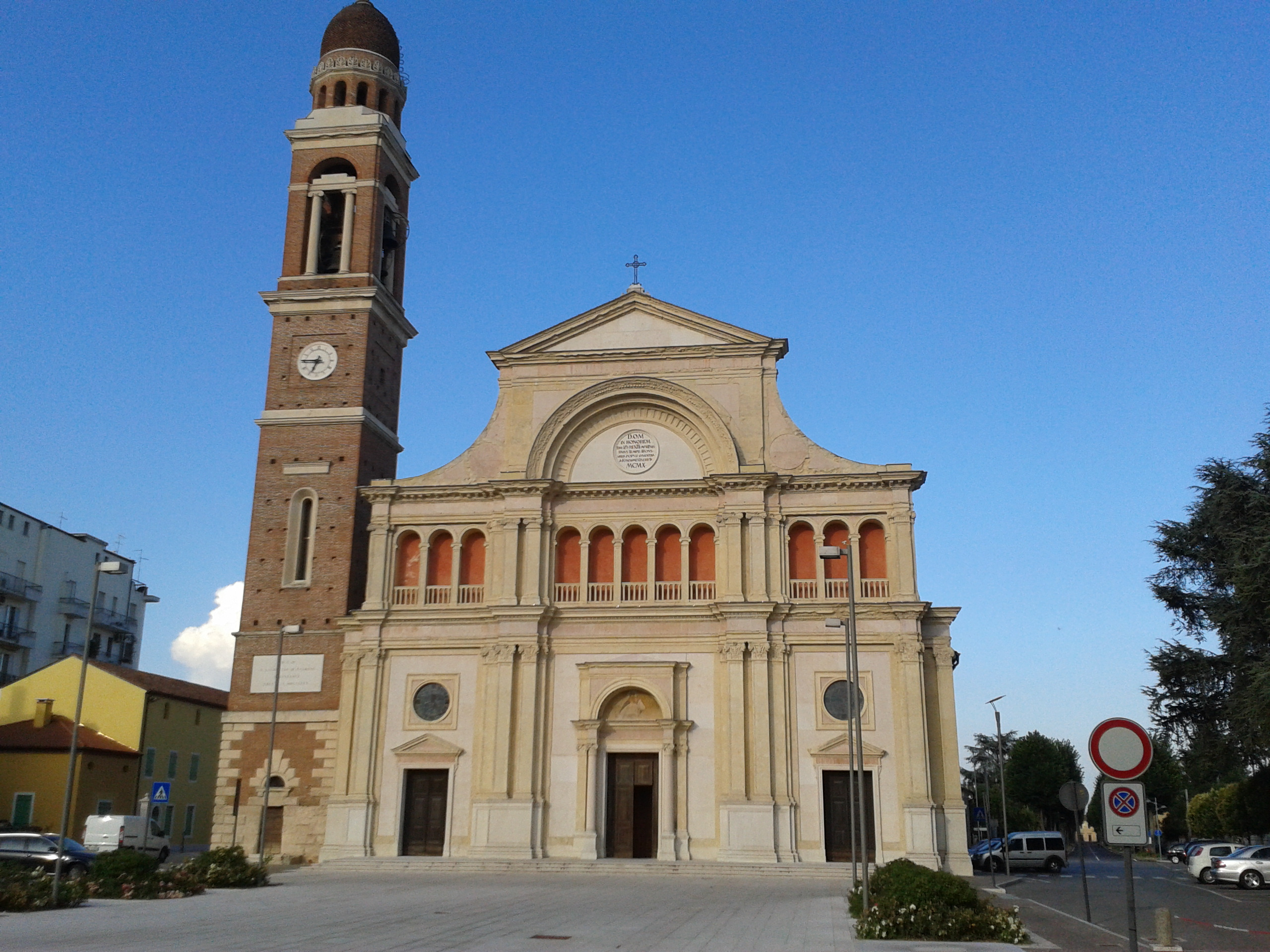 Foto della Chiesa parrocchiale di San Lorenzo di Minerbe